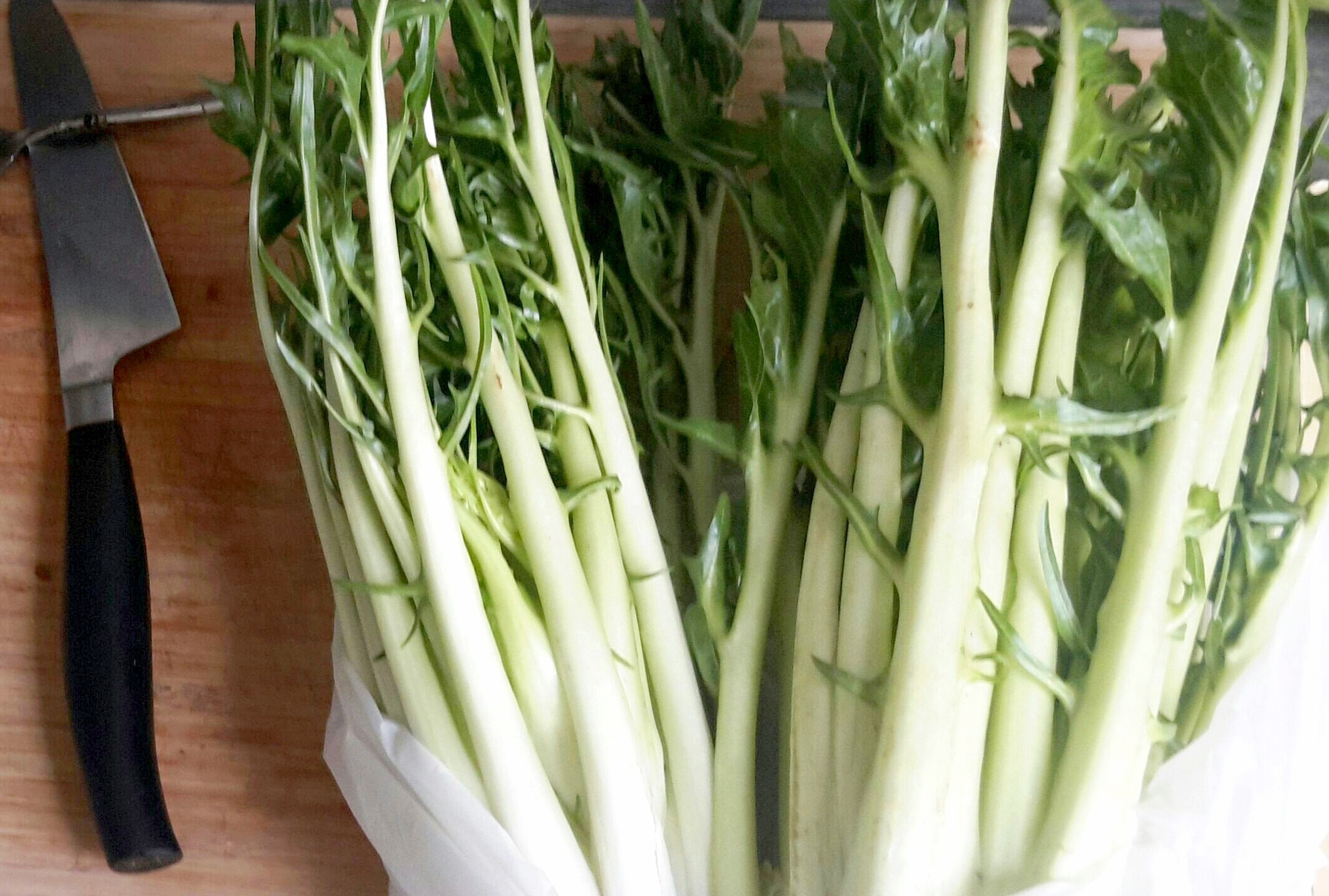 Zwei Punterellen mit äußeren Blättern